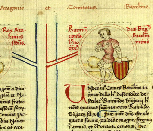 Genealogia regum Navarrae et Aragoniae et comitum Barchinonae, f.34r Genealogies dels comtes de Barcelona; continuades per l'arxiver Jaume Garcia i per Pere Miquel Carbonell Manuscrit 246, BC Raimundus Berengarii comitis Barchinine huius nominis quartus. Undecimus comes Barchinone in corondello huius descendente describitur Raimundus Berengarii, huius nominis quartus, supramemorati Raimundus Berengarii filius. Fuit autem dominus este elegantis forme, prudencie magne, strenuus in armis et omni virtute ornatus.(f.34r) [...] Numquam tamen voluit rex appellari, sed administrator regni, nec arma comitatus mutare, unde adhuc signa regalia sunt illa que comitis Barchinone erant. f.34v)